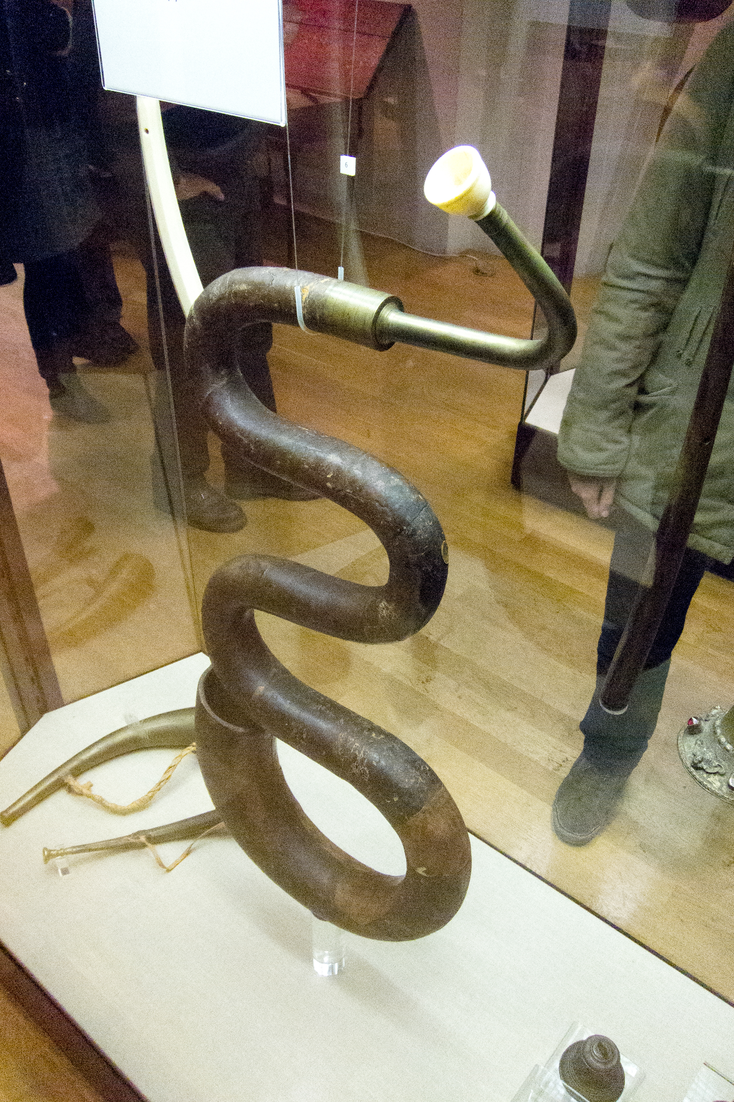 Antique horn instrument Berlin 2012